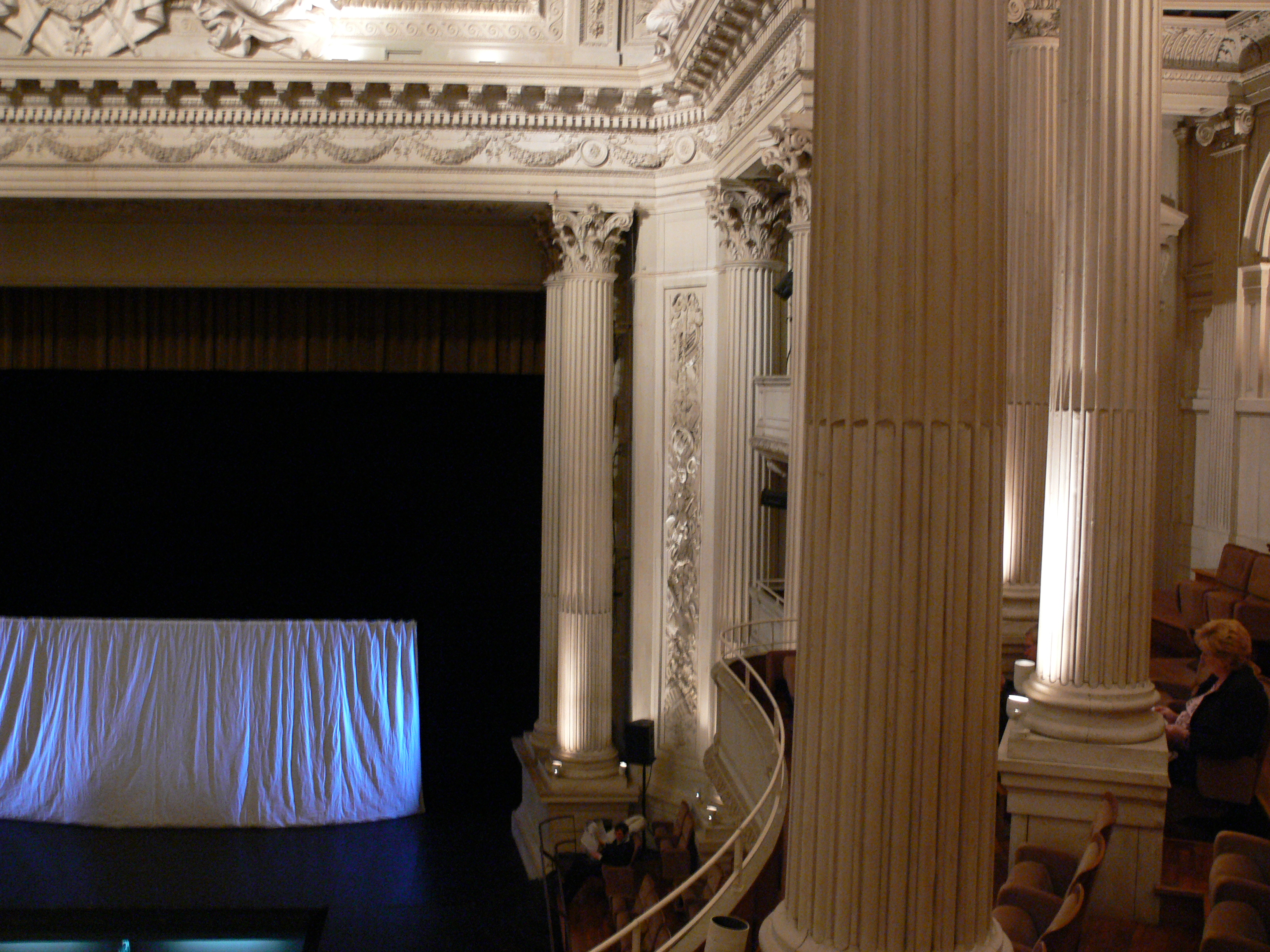 Compiègne, France: Théâtre Impérial de Compiègne